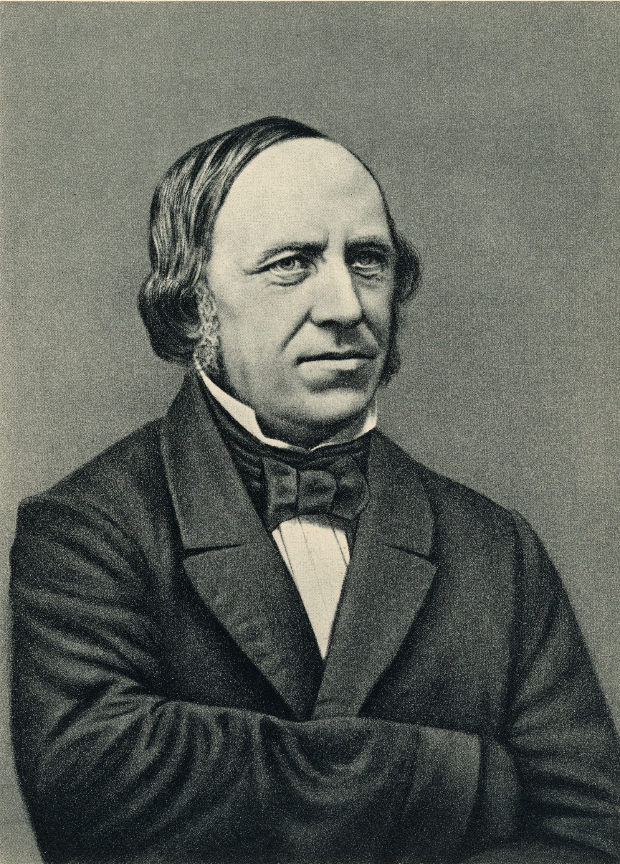 Format: Litografi Utgivelsesår / Published: 1914 (Vore Høvdinger 32). Utgiver / Publisher: F. Bruns Bokhandels Forlag, Trondhjem. Eier / Owner Institution: Trondheim byarkiv, The Municipal Archives of Trondheim Arkivreferanse / Archive reference: Ila skole, Va - F9411